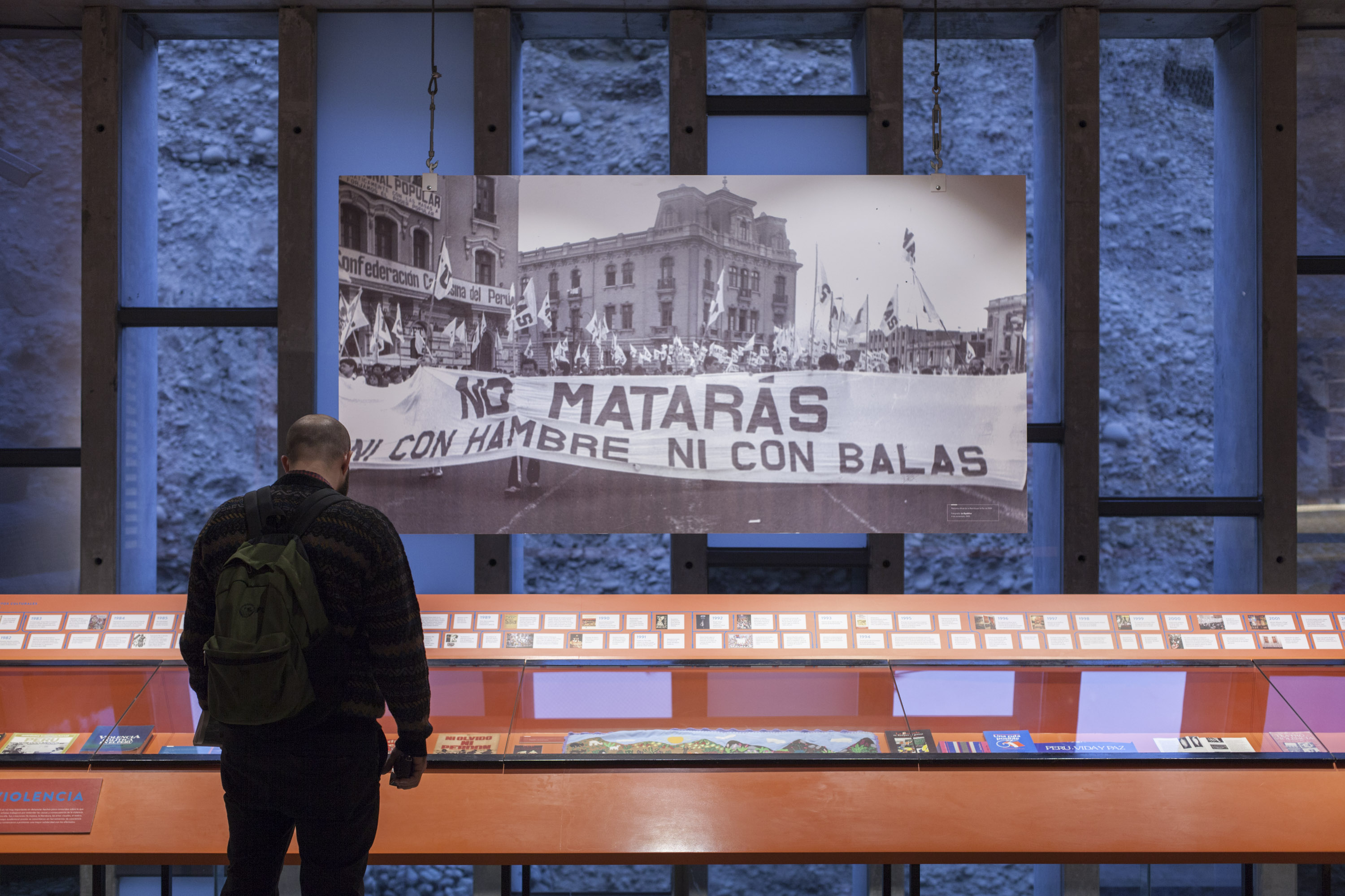 Muestra permanente del Lugar de la Memoria, la Tolerancia y la Inclusión Social